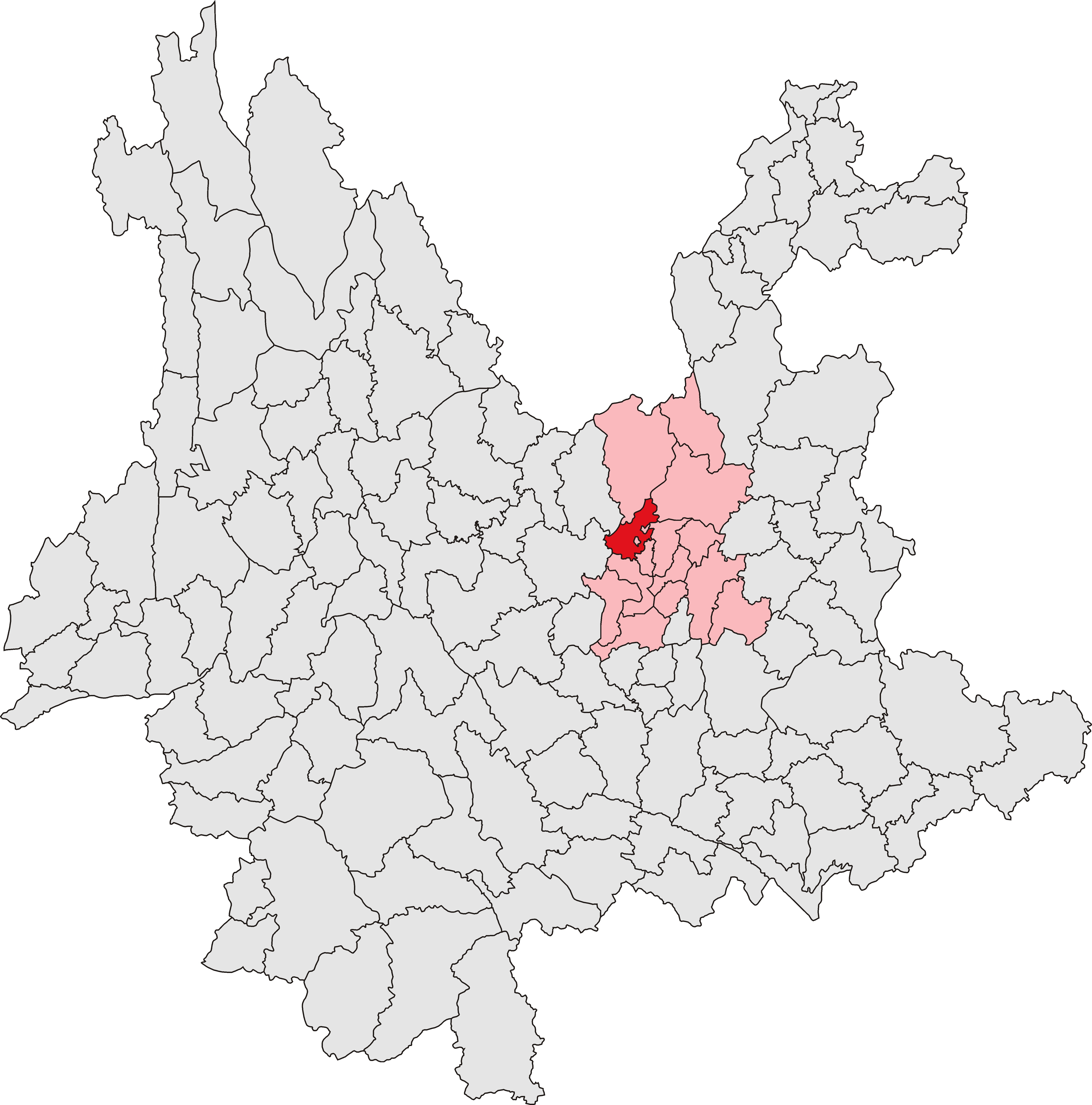 中文（中国大陆）: 富民县位置图